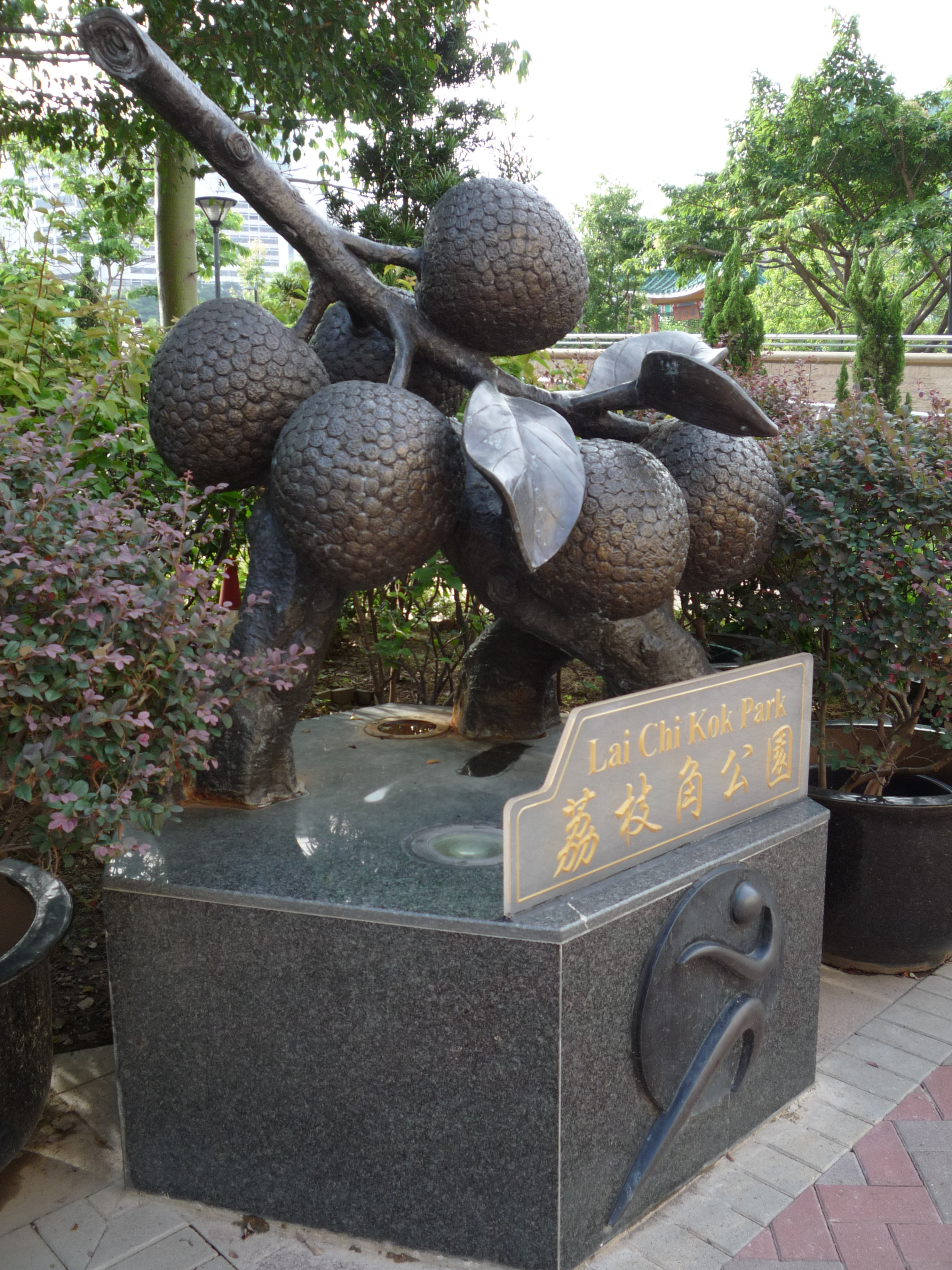 中文（香港）: 荔枝角公園內的一個擺設